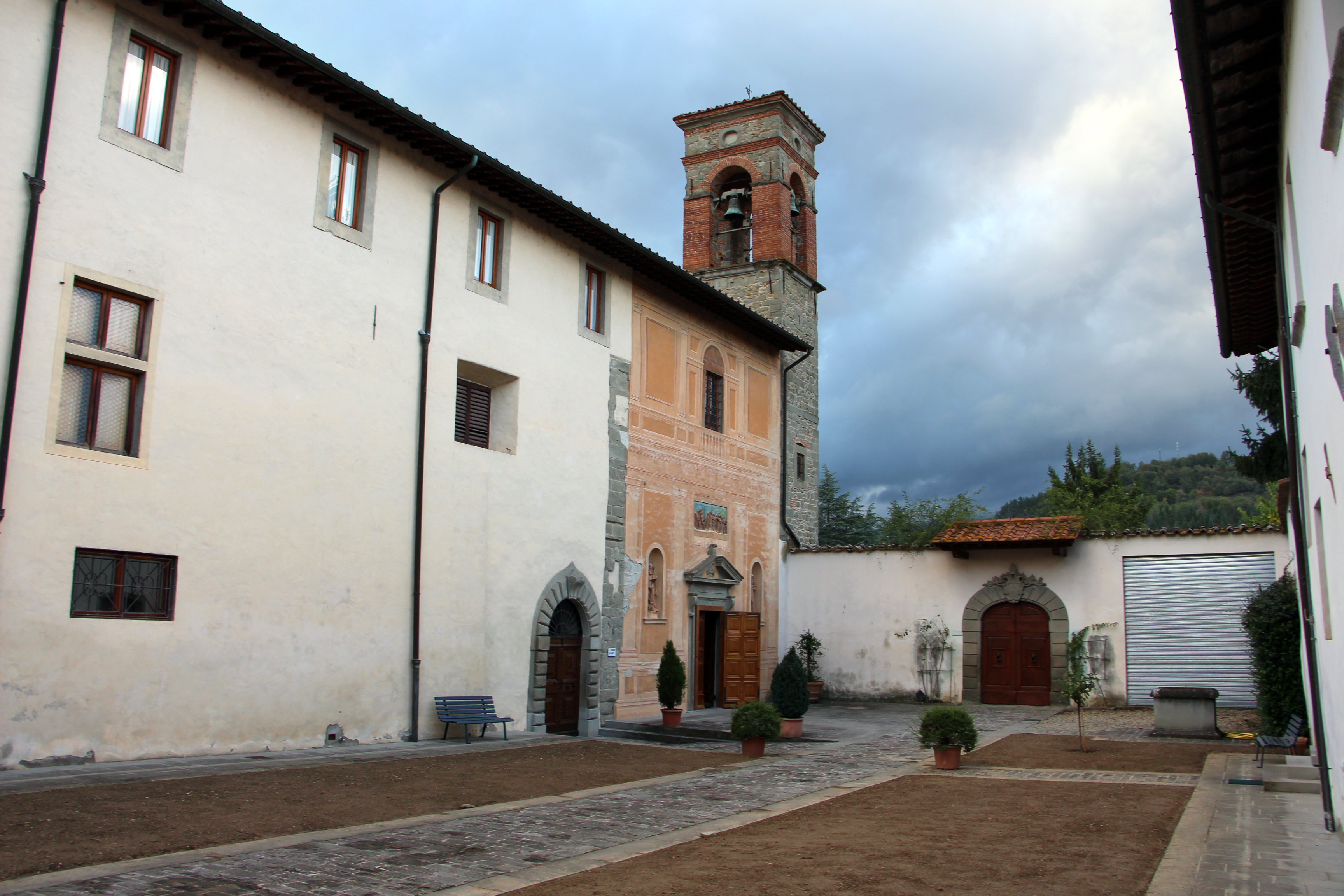 San Giovanni Evangelista (Pratovecchio)